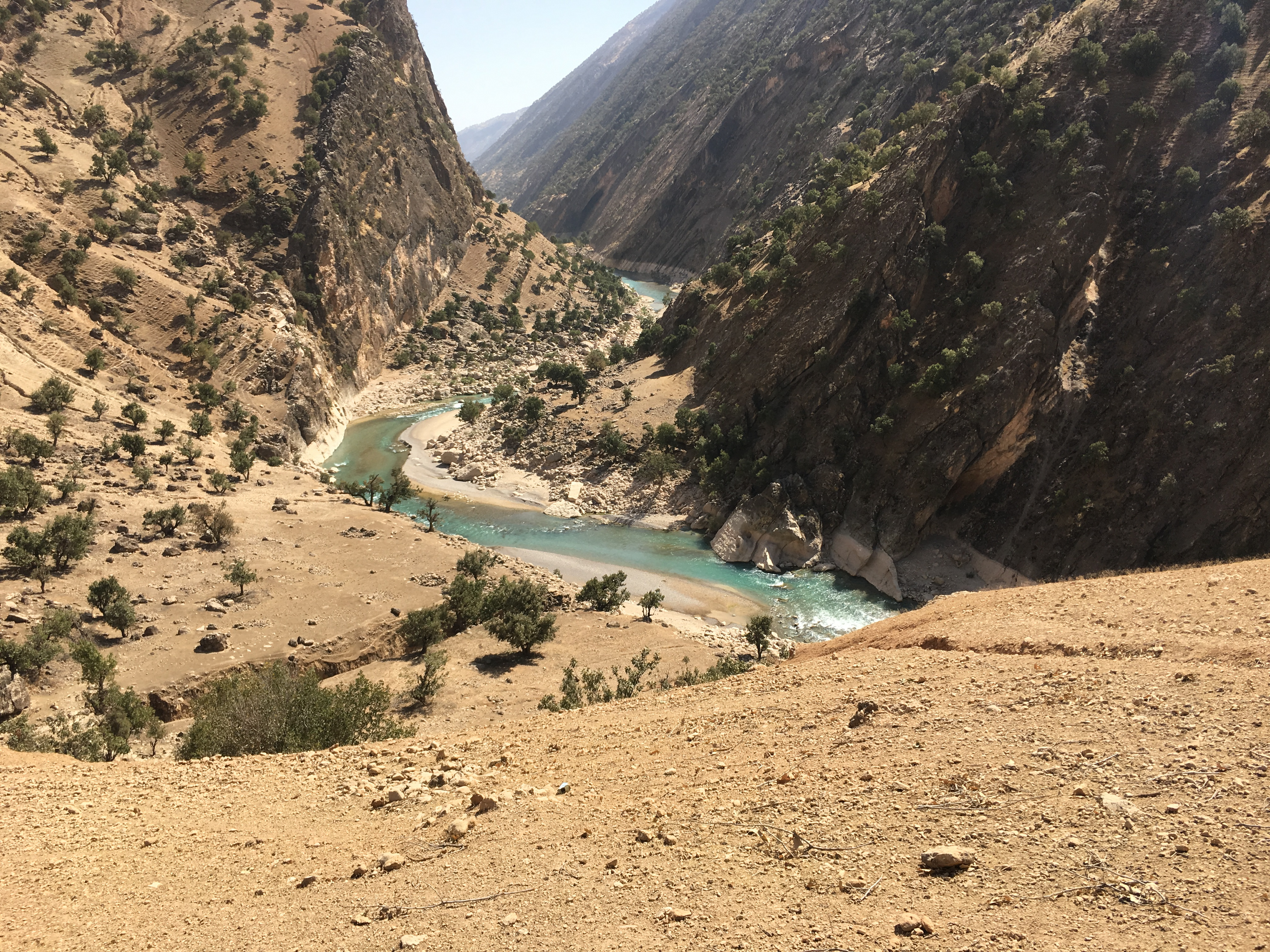 بازفت